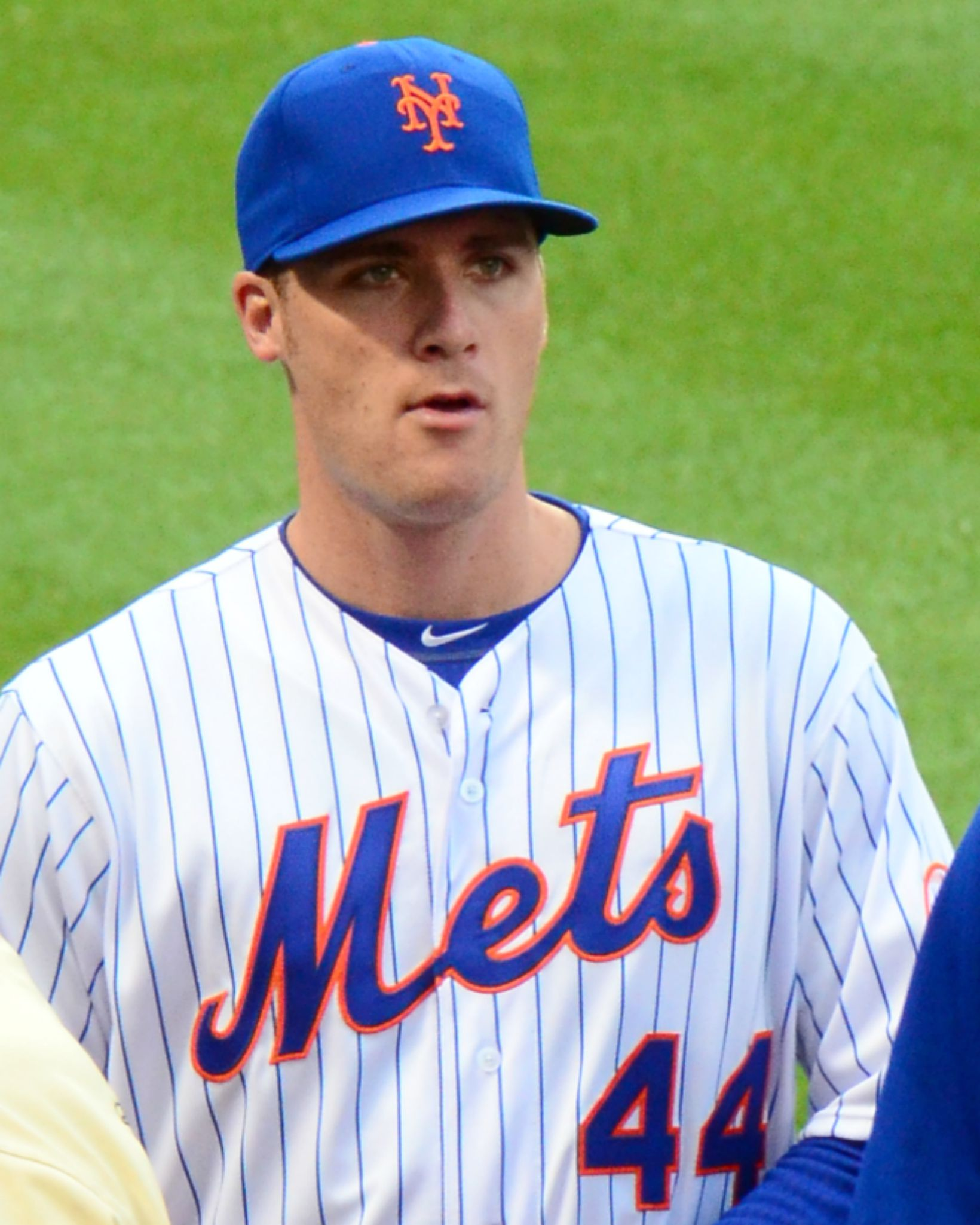 Eric O'Flaherty